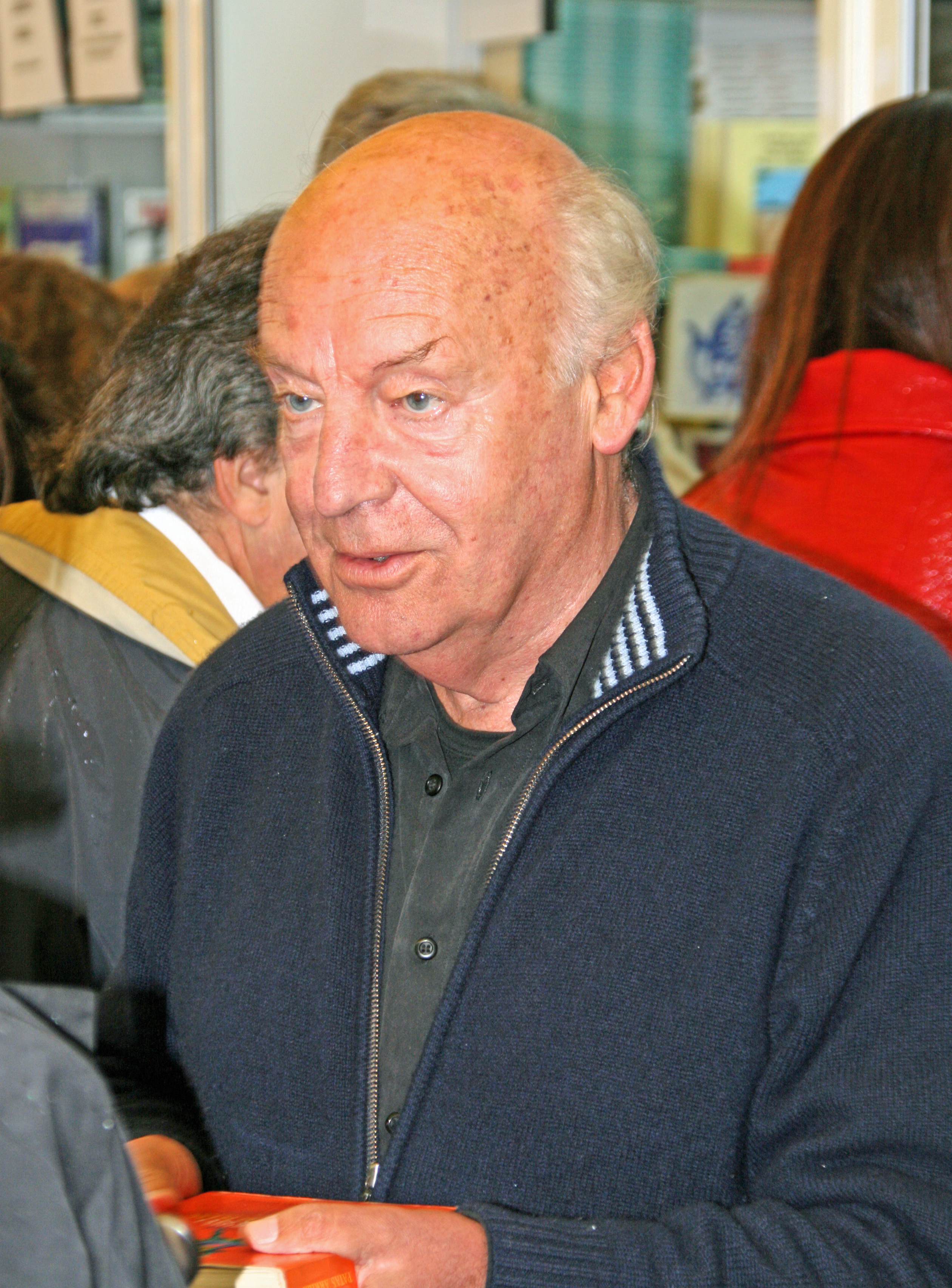 Eduardo Galeano en la Feria del Libro de Madrid, 31 de mayo de 2008